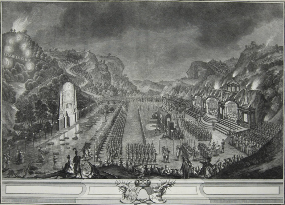 Bergparade zum Saturnusfest am 26. September 1719 im Plauenschen Grund. In der Mitte der Bergaufzug, rechts der Saturnustempel, links die Weißeritz mit Brücke im Hintergrund und Illimination